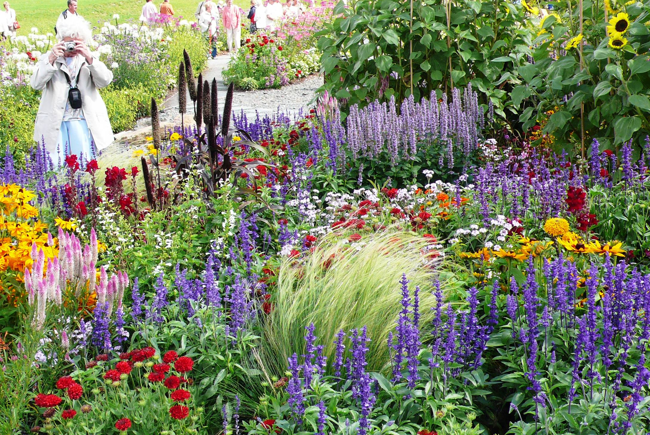 Sommerblumen fotografieren